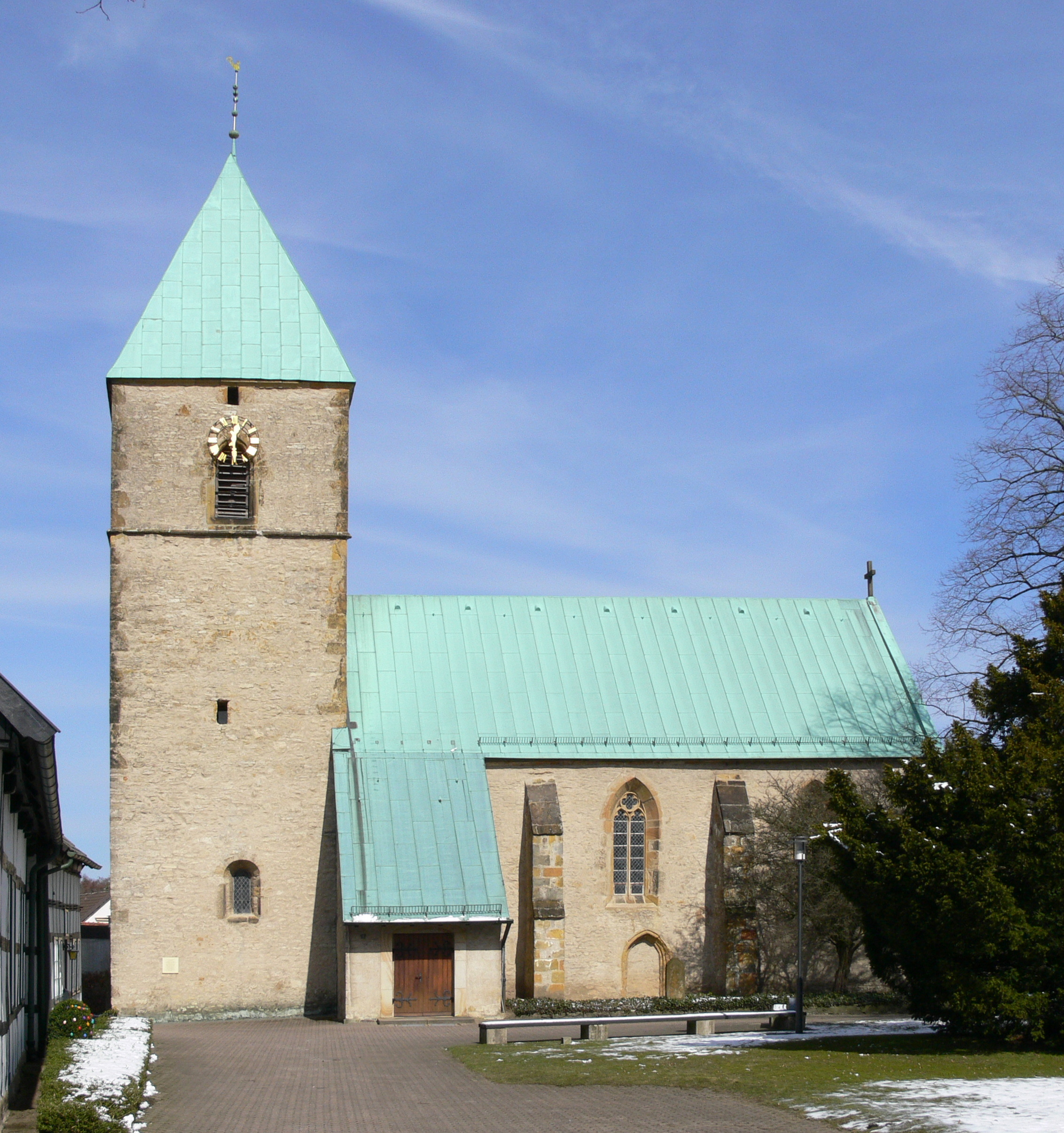 Bielefeld Kirchdornberg, Am Tie 17, Peterskirche